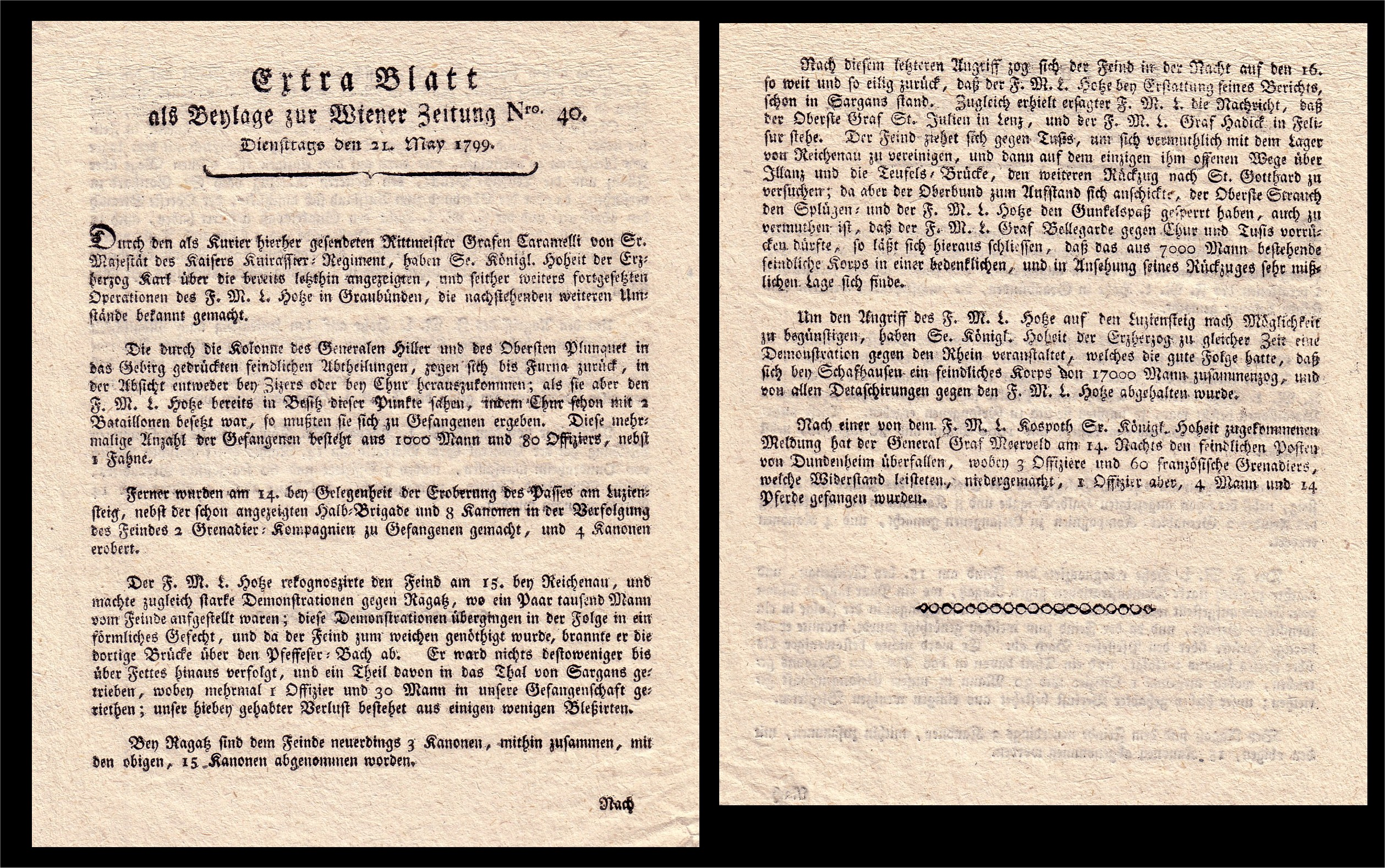 Extrablatt zur Wiener Zeitung vom 21. Mai 1799 zum Kampf von österreichischen und französischen Truppen in der Schweiz * Scan: 200 dpi * Eingescannt von: Henryart in dessen Eigentum sich das Werk befindet